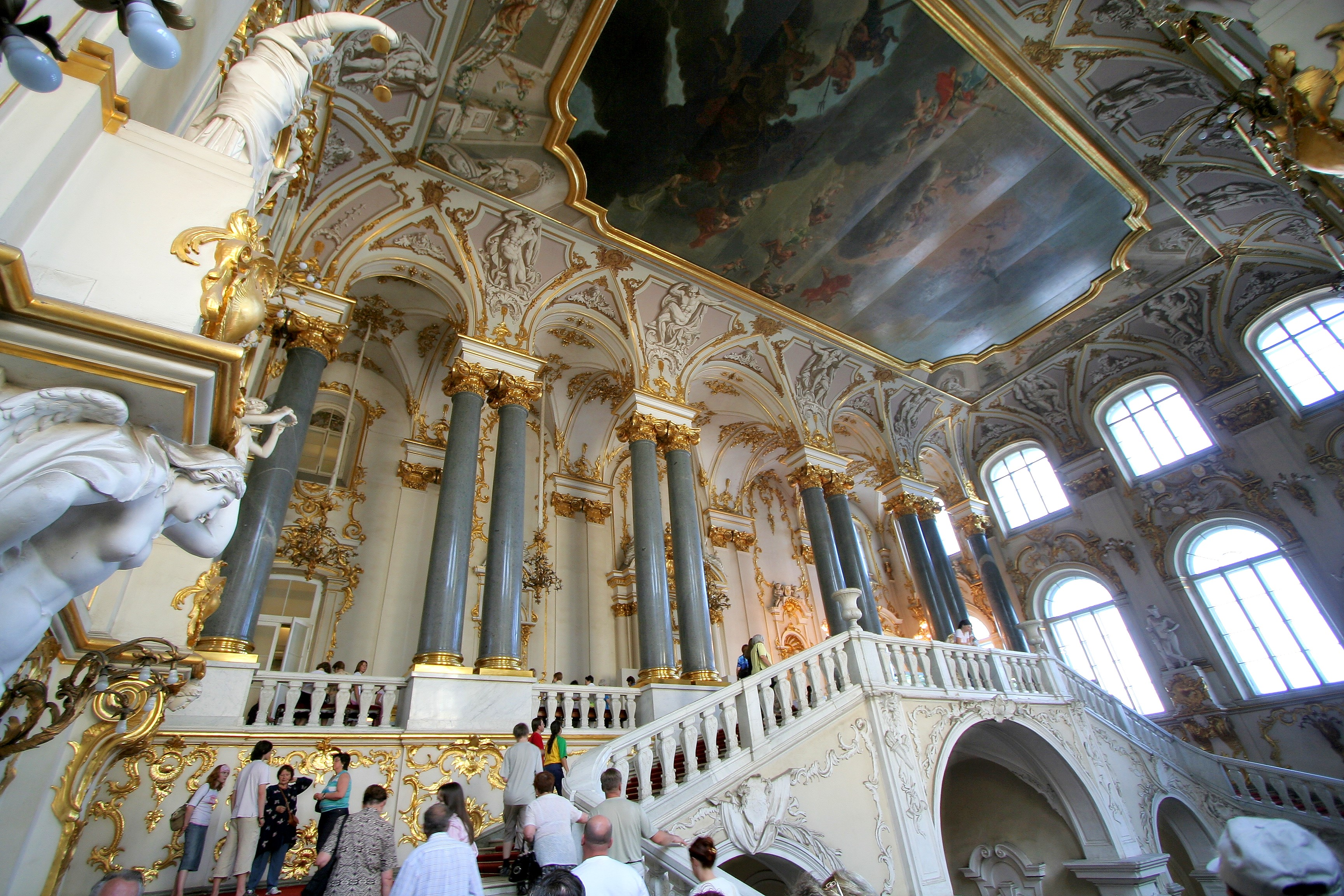 Diplomatsko stubište u Ermitažu.